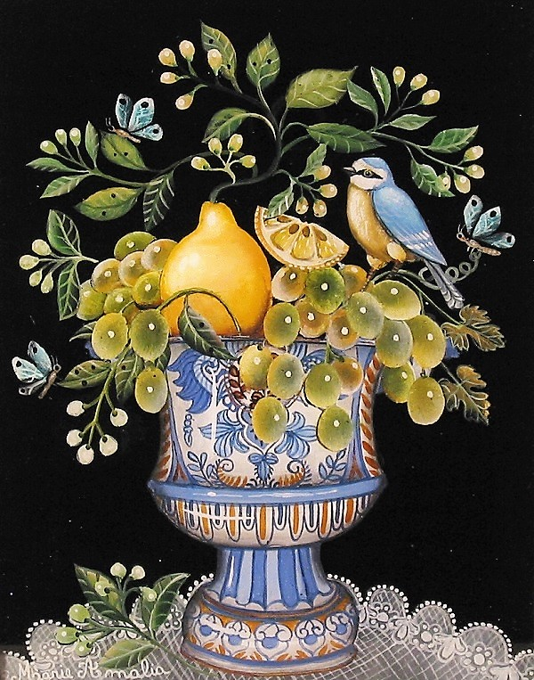 tableau